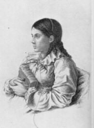 Bettina von Brentano